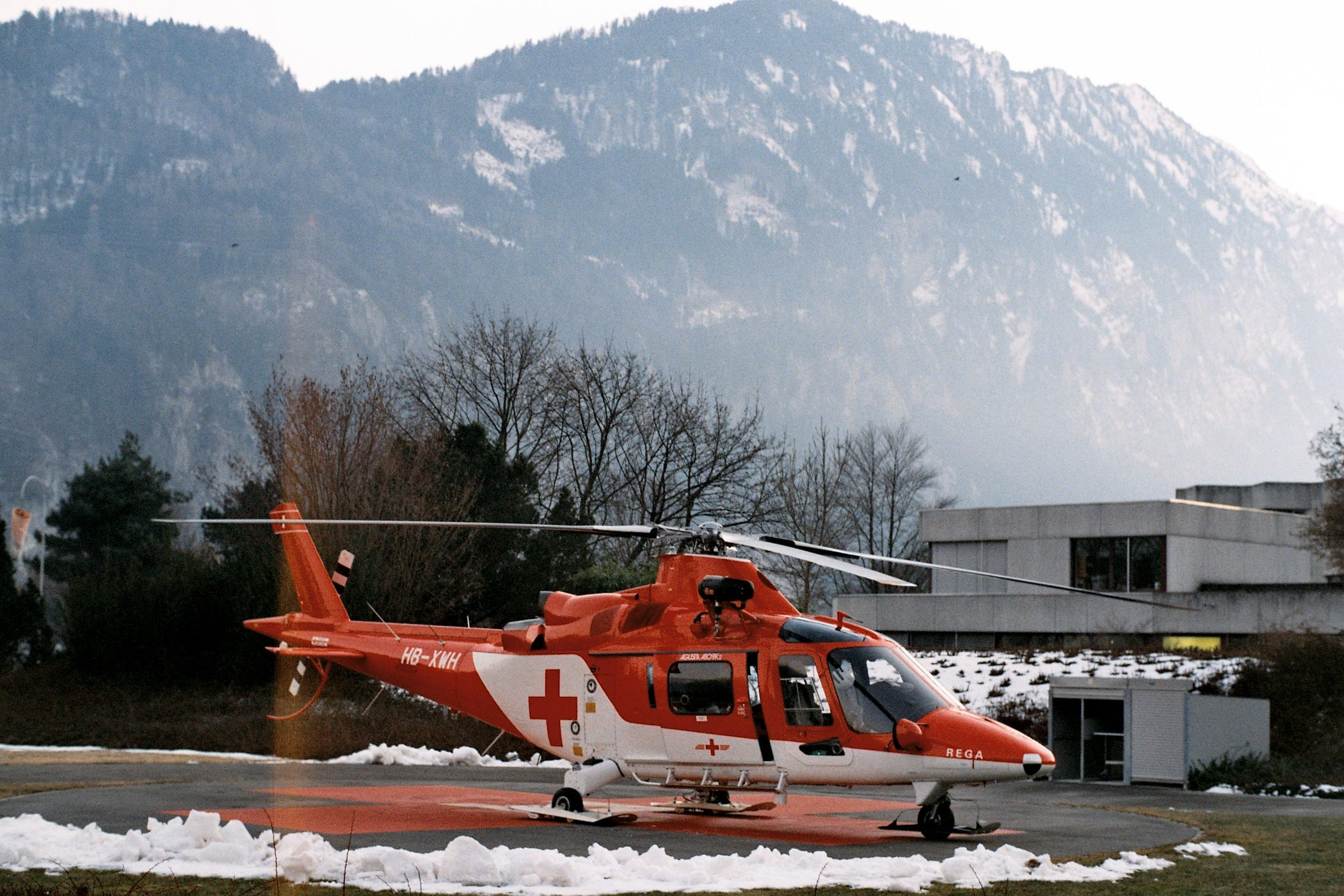 Hélicoptère de la Rega sur le héliport du hôpital Interlaken